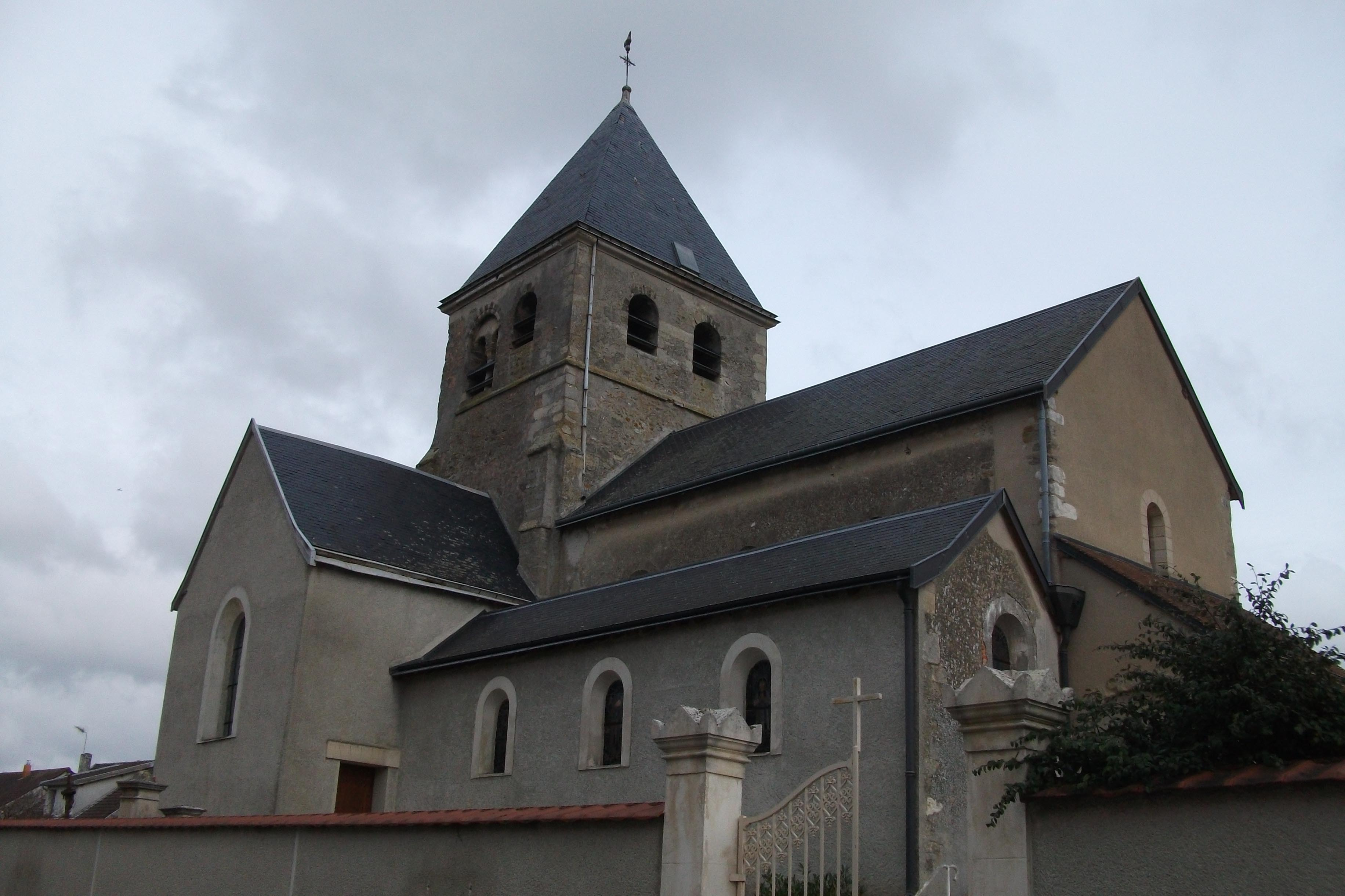 l'église de Champfleury vue depuis le nord ouest, au premier plan son cimetière.